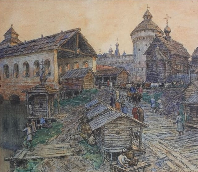 Воскресенский крытый мост. Москва XVII век.